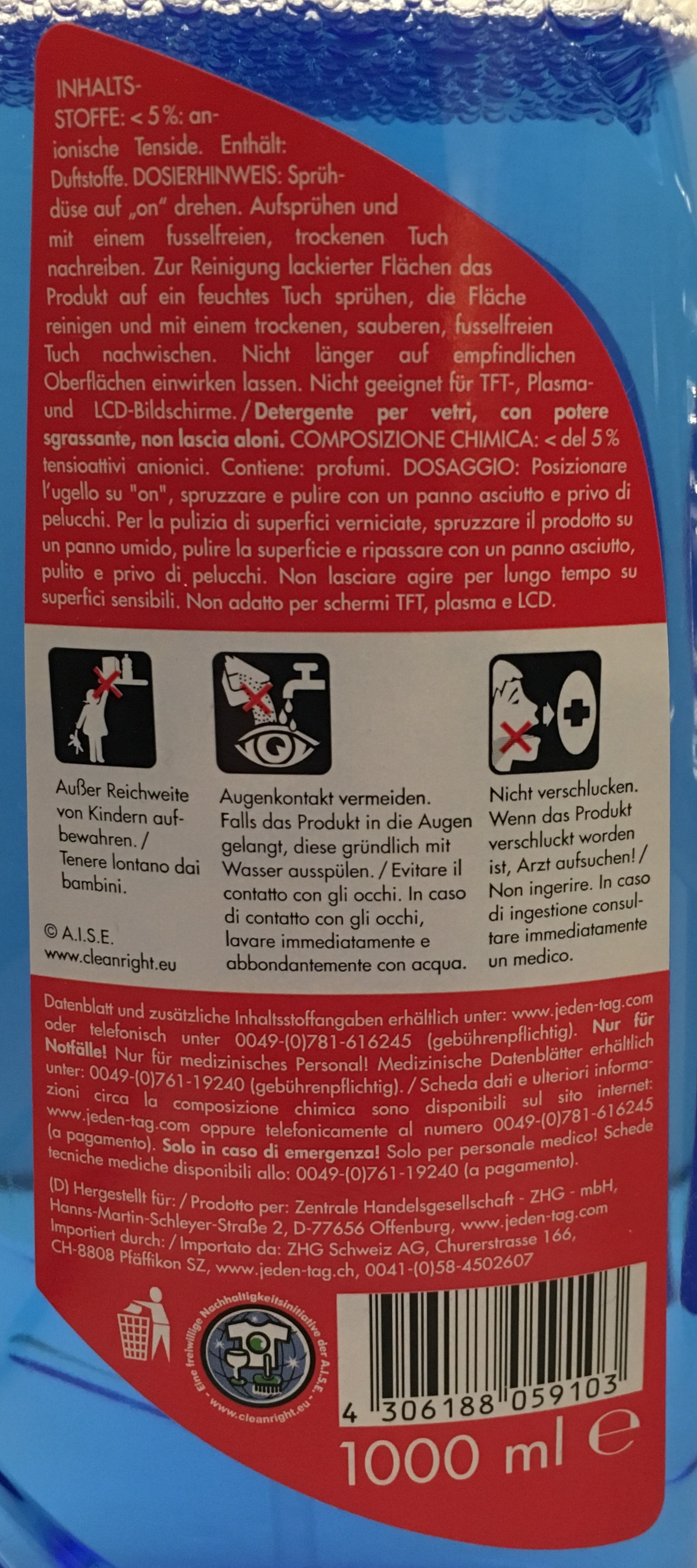 Glasreiniger Etikett